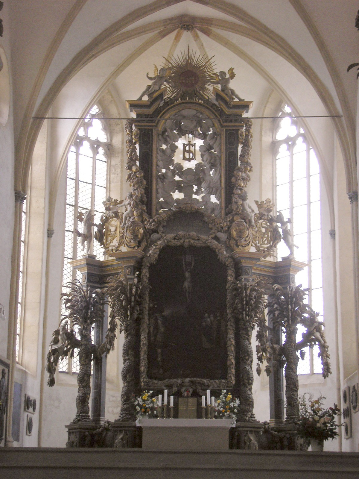 Der Altar des Doms in Zeitz.